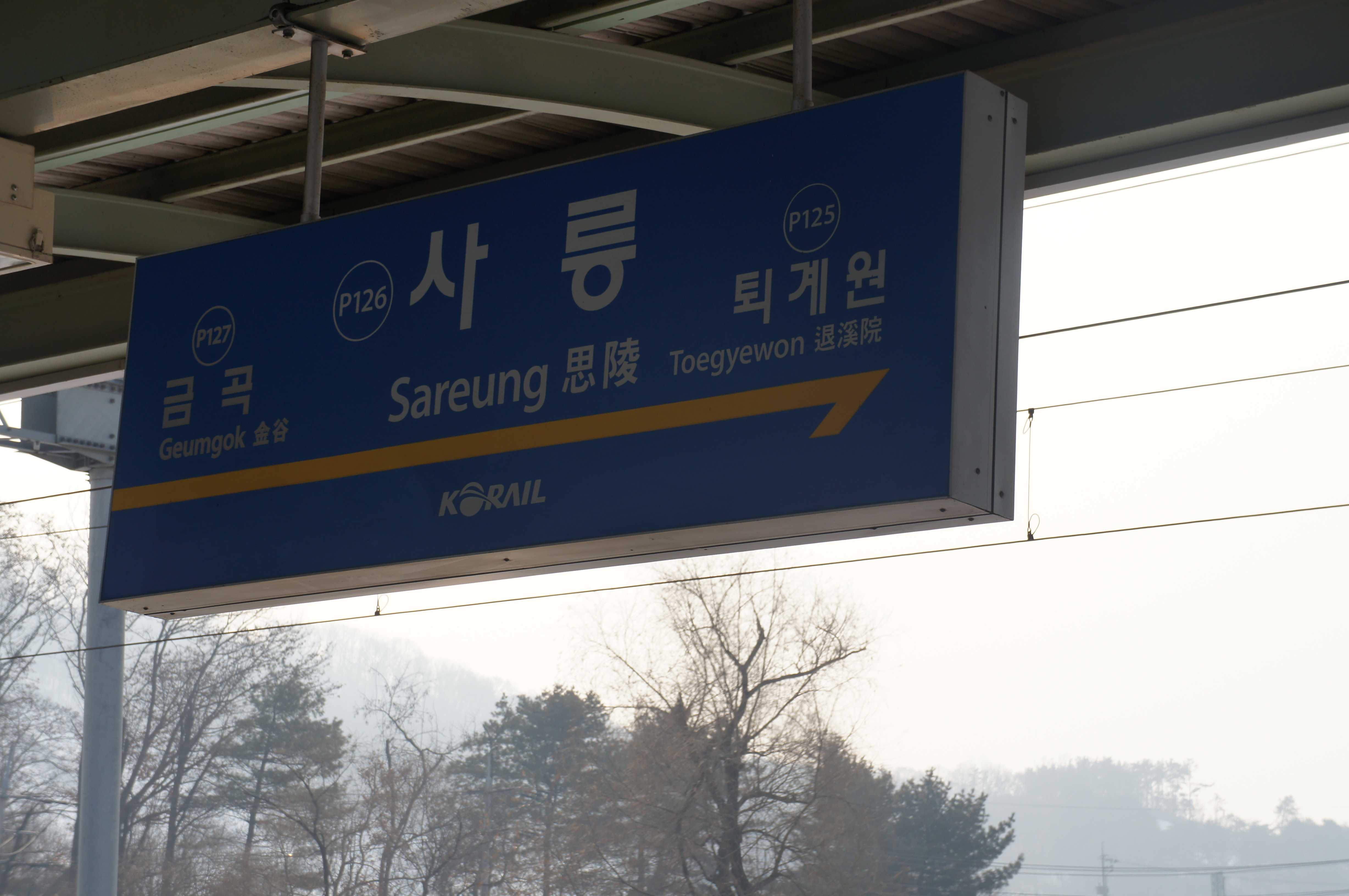 사릉역 역명판